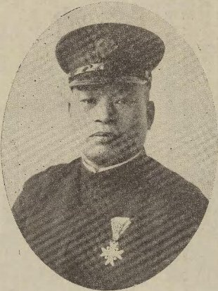 永山止米郎